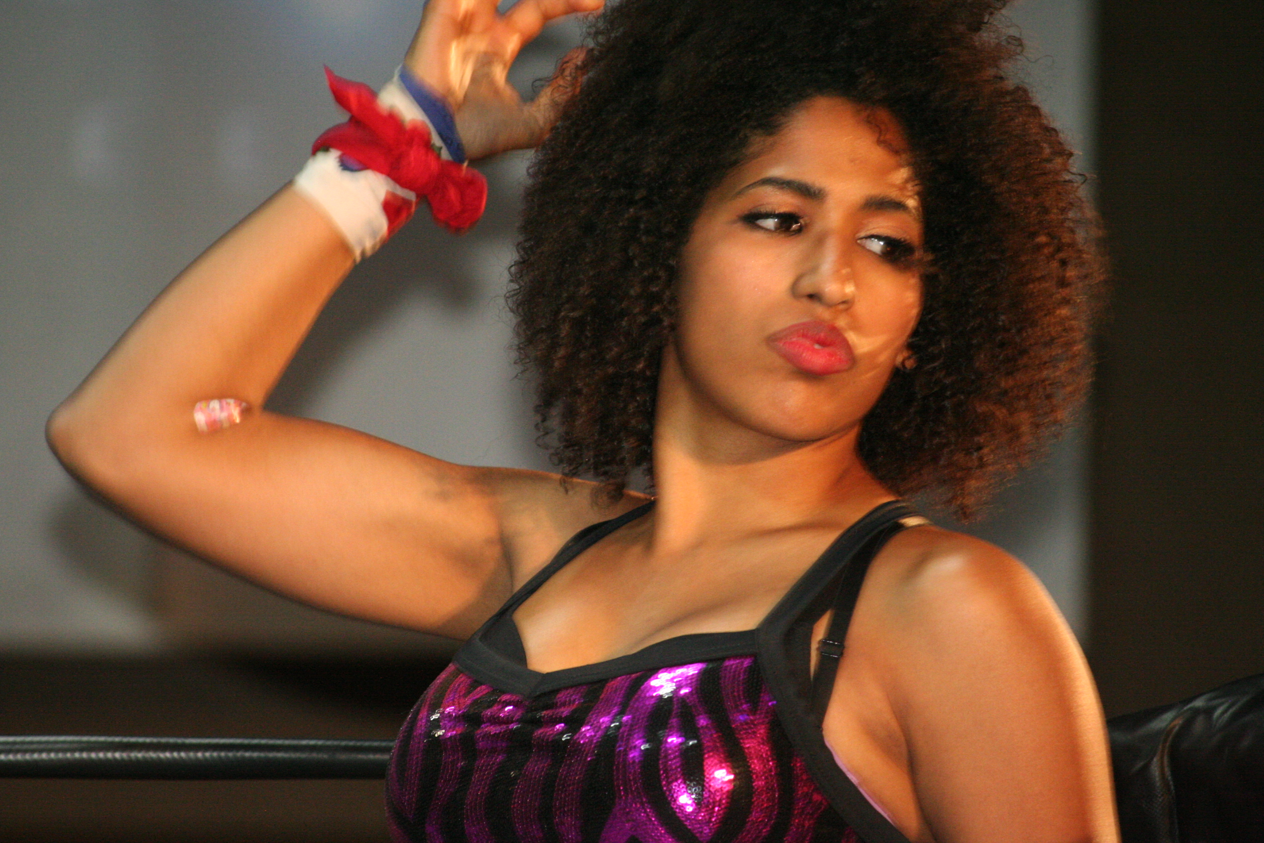 Marti Belle